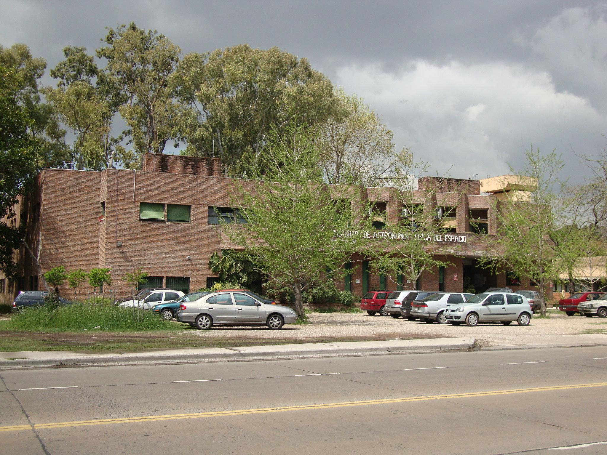 Sede del Instituto de Astronomía y Física del Espacio (IAFE), dependiente del CONICET, en Ciudad Universitaria. Obra del arquitecto Rodolfo Livingston diseñada en 1981 e inaugurada en 1984. Buenos Aires, Argentina.